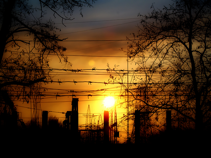 закат возле Днепрогеса